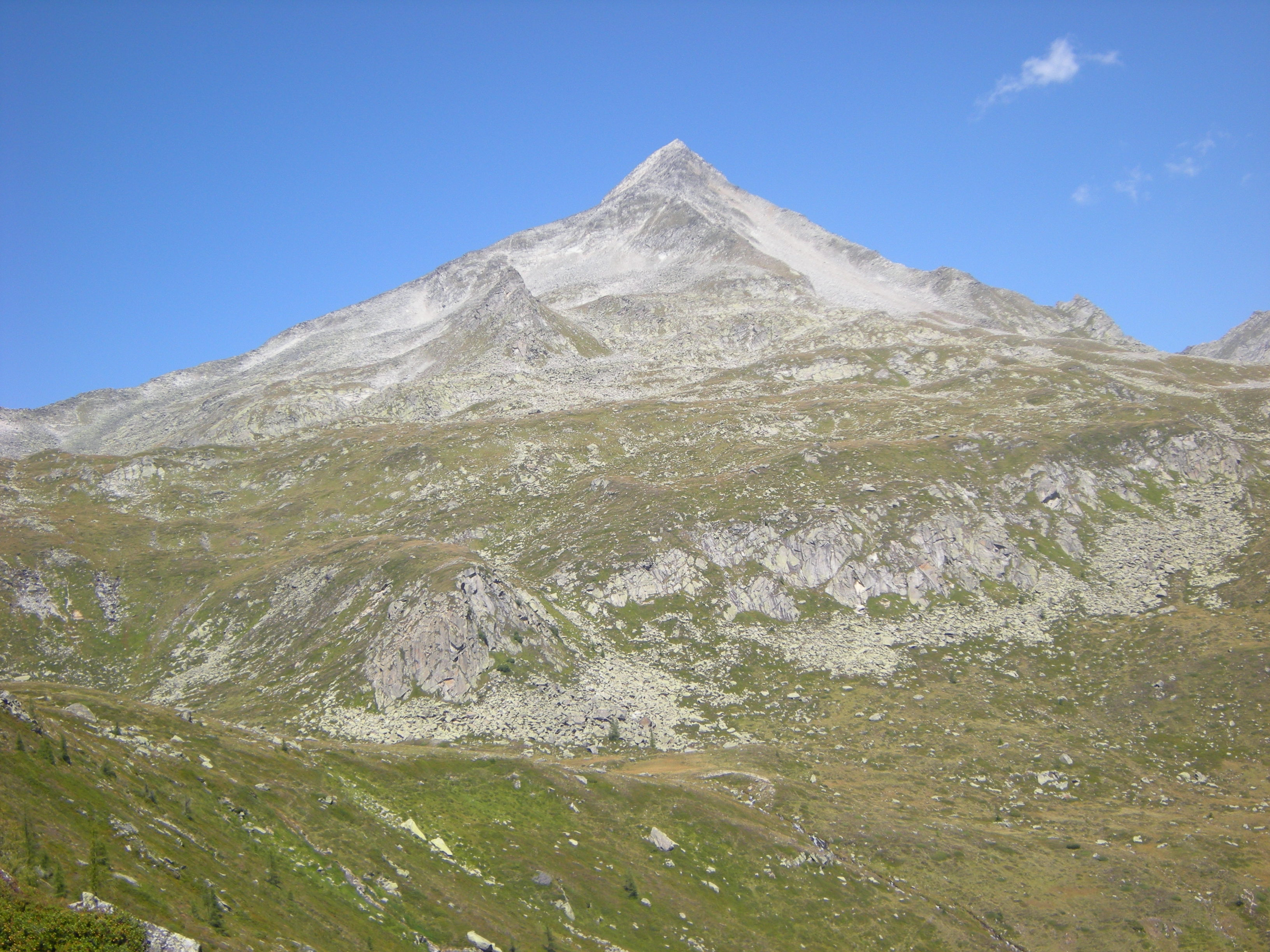 Rauhkofel von der Waldner Alm